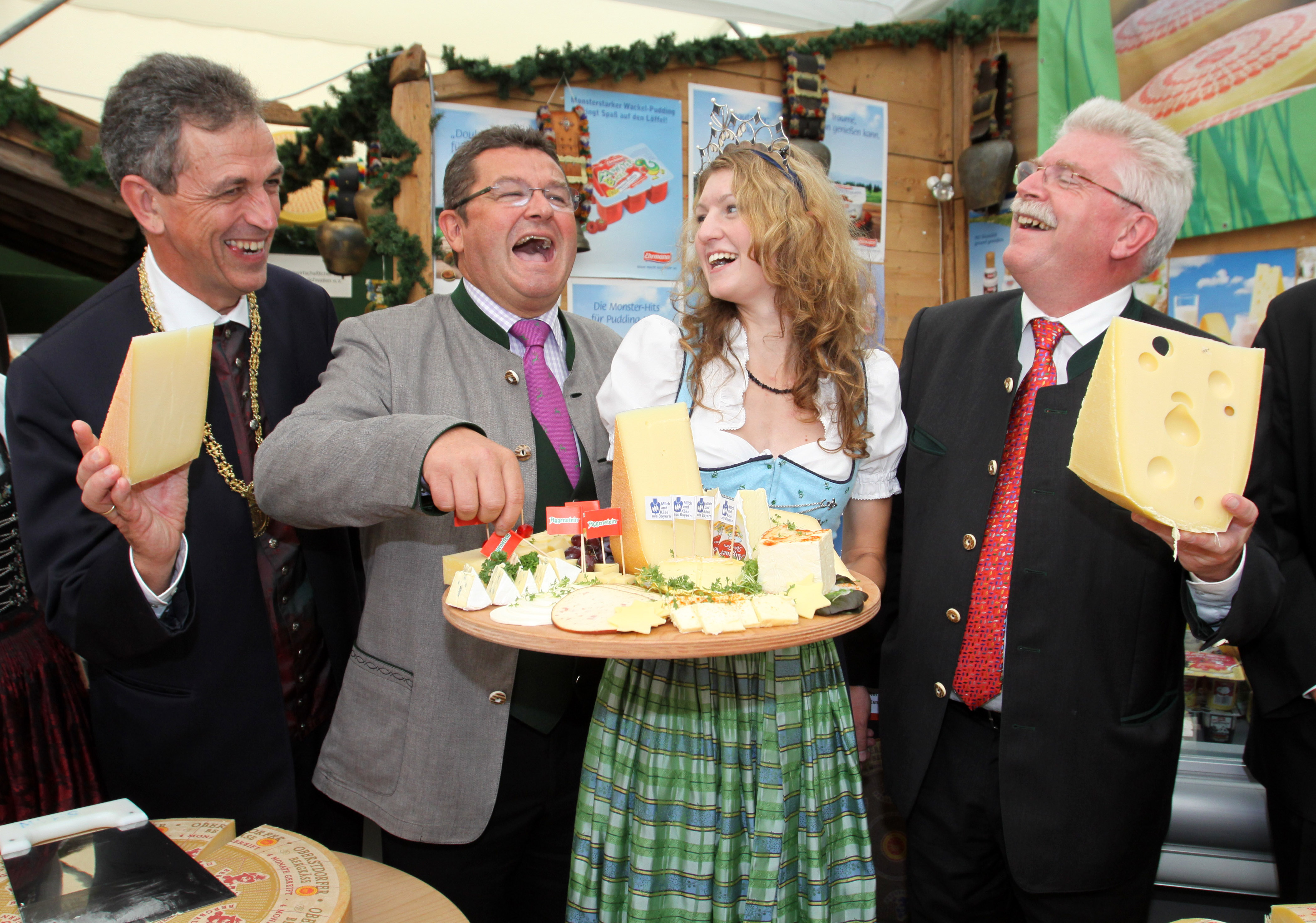 Allgäuer Festwoche Kempten